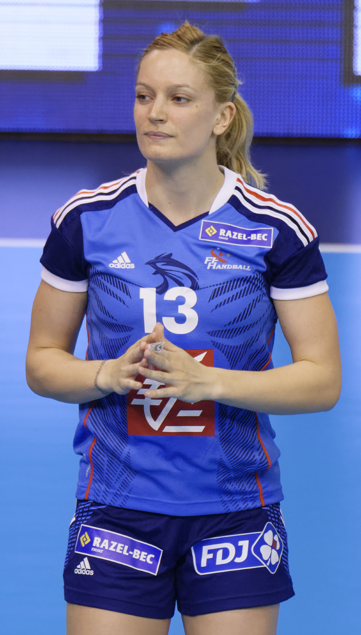 Rencontre entre la France et le Danemark lors de la Golden League 2015. A Dijon, le 19 mars 2015.